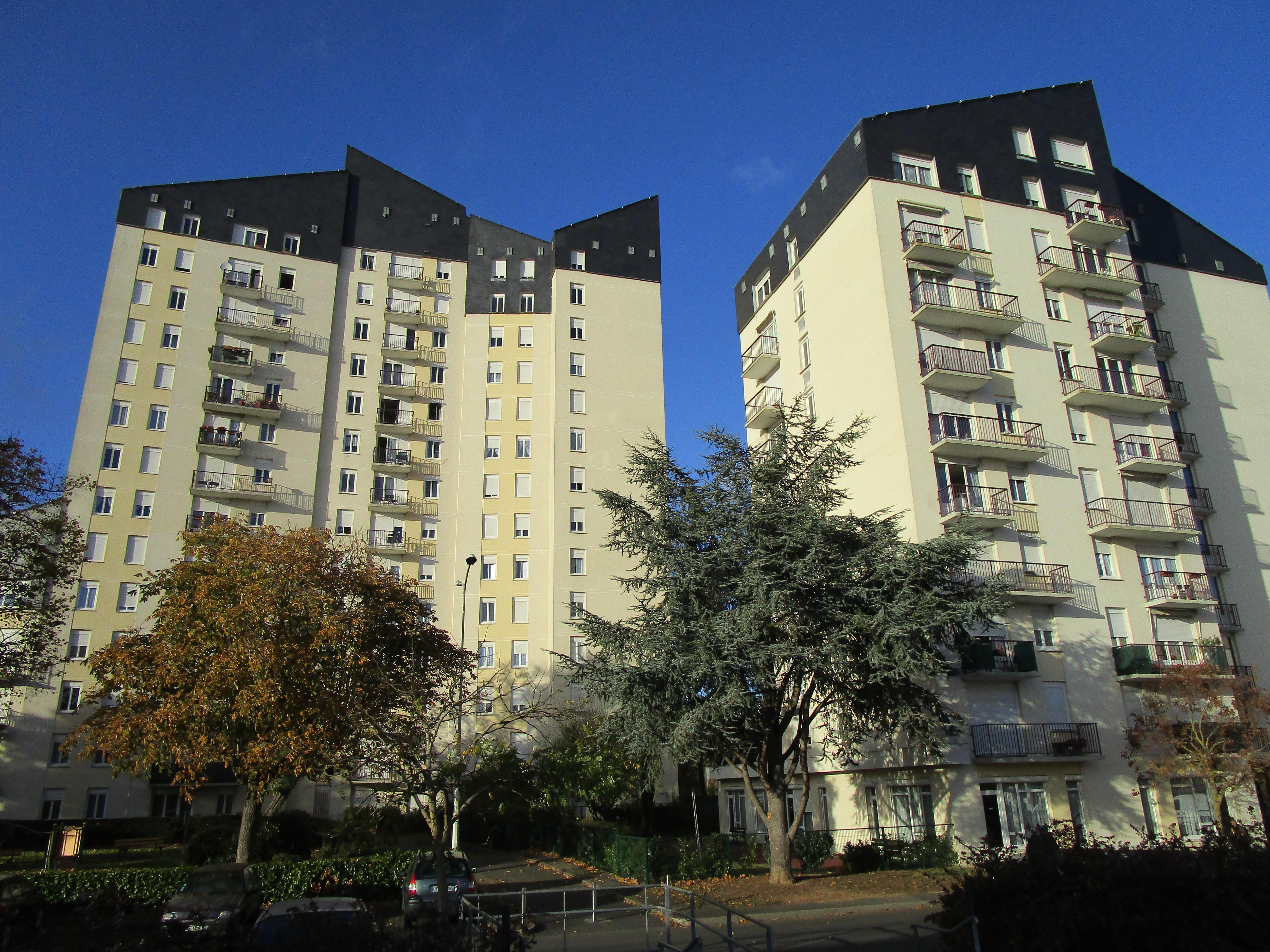 Immeuble sur la rue du Général Witkowski dans le quartier Lamartine de Tours.